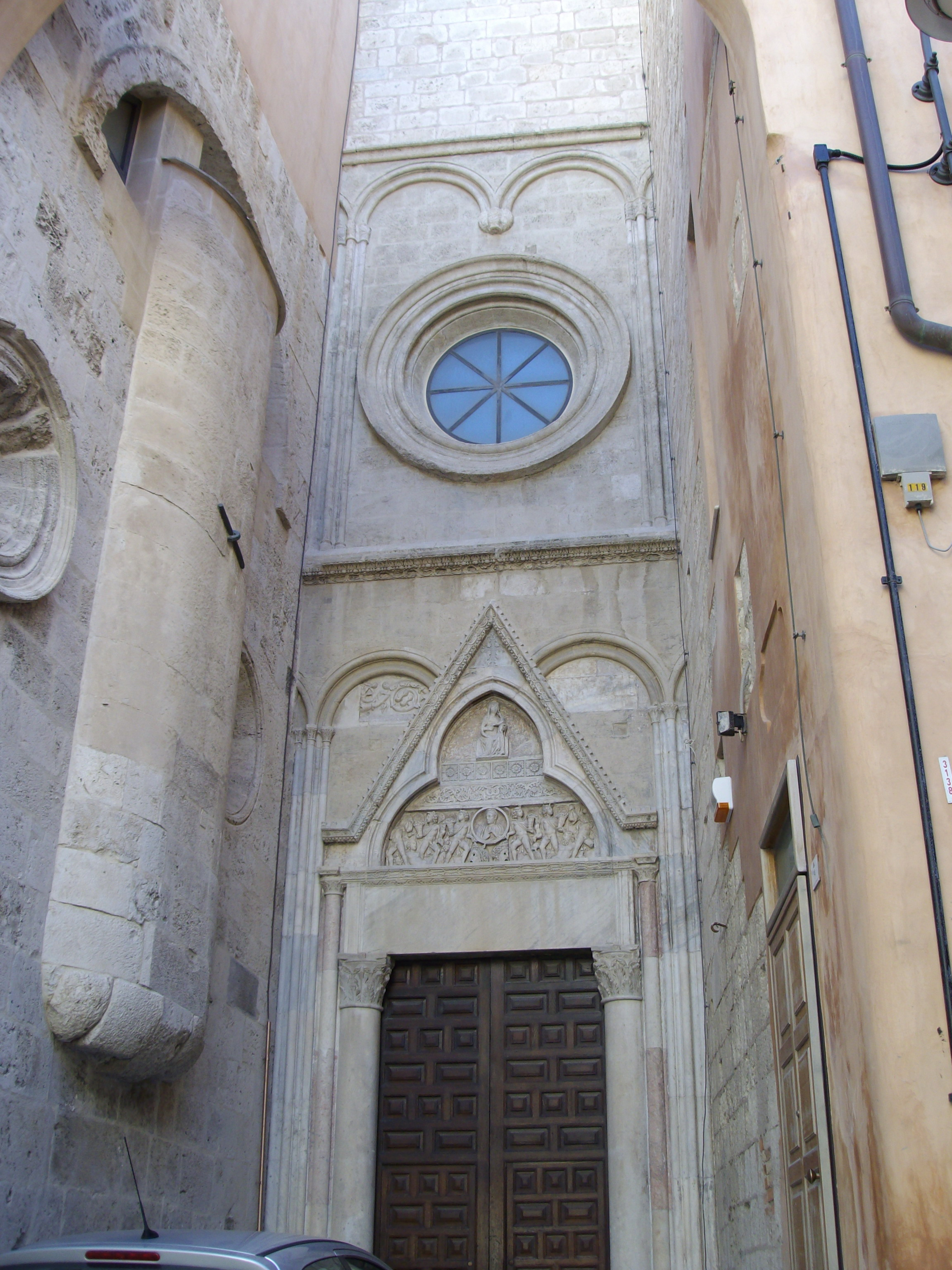 Transetto della cattedrale di Cagliari